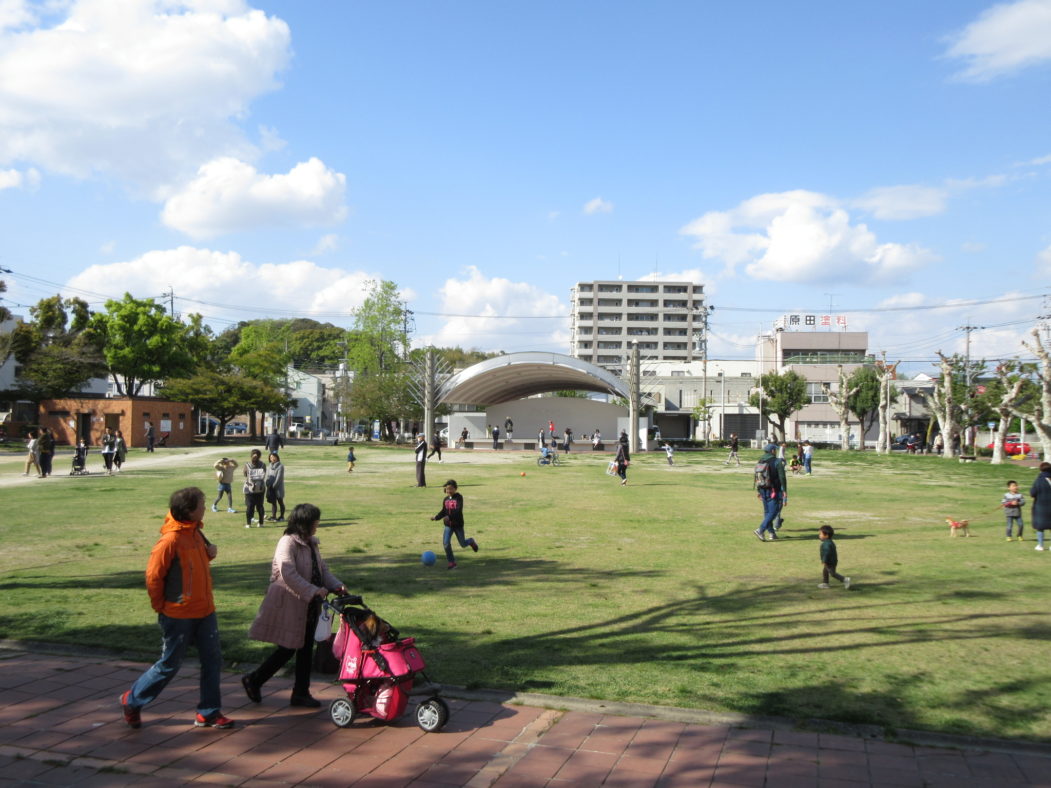 籠田公園（愛知県岡崎市）